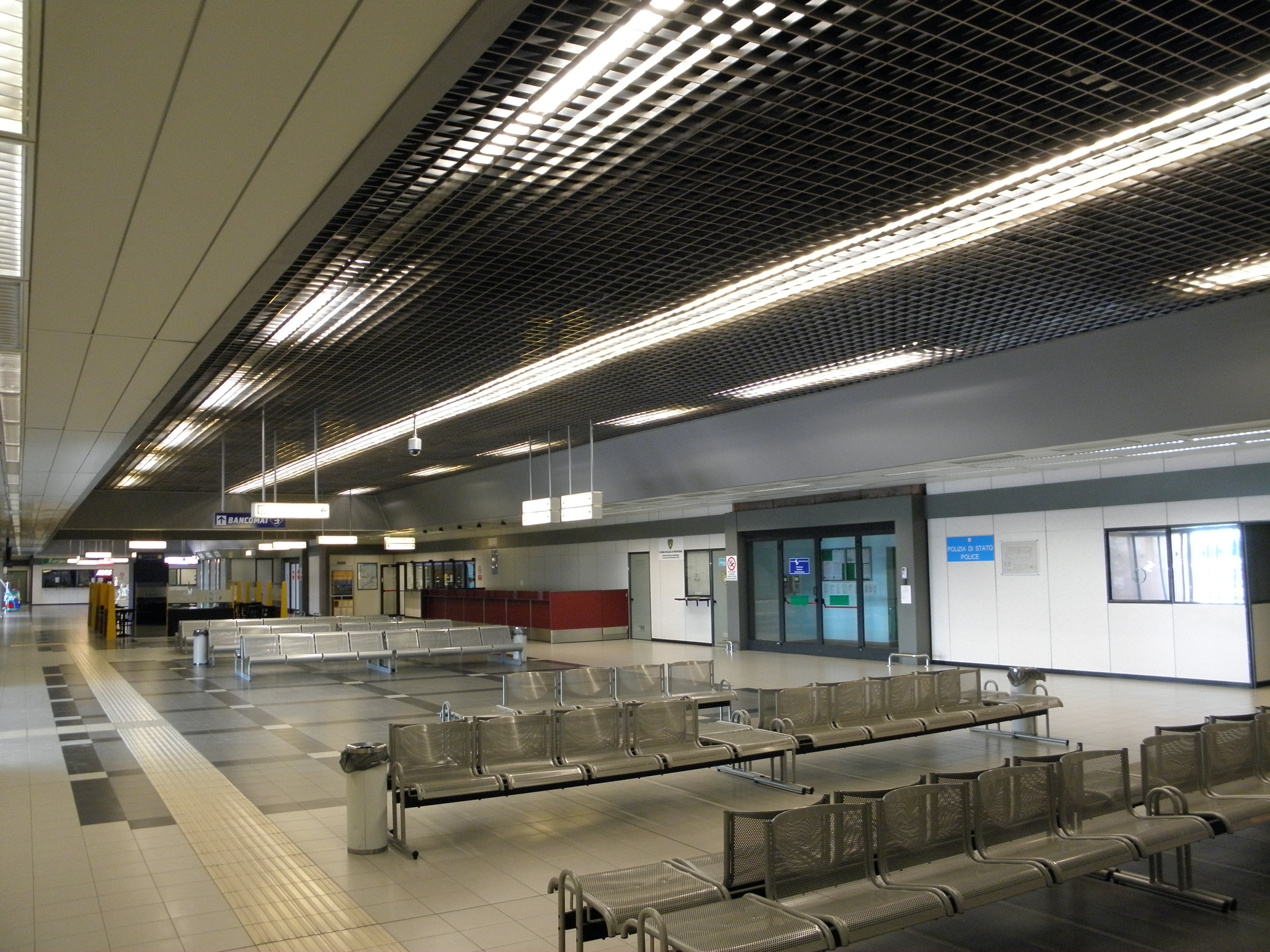 Montichiari, Aeroporto di Brescia-Montichiari "Gabriele D'Annunzio": interno.